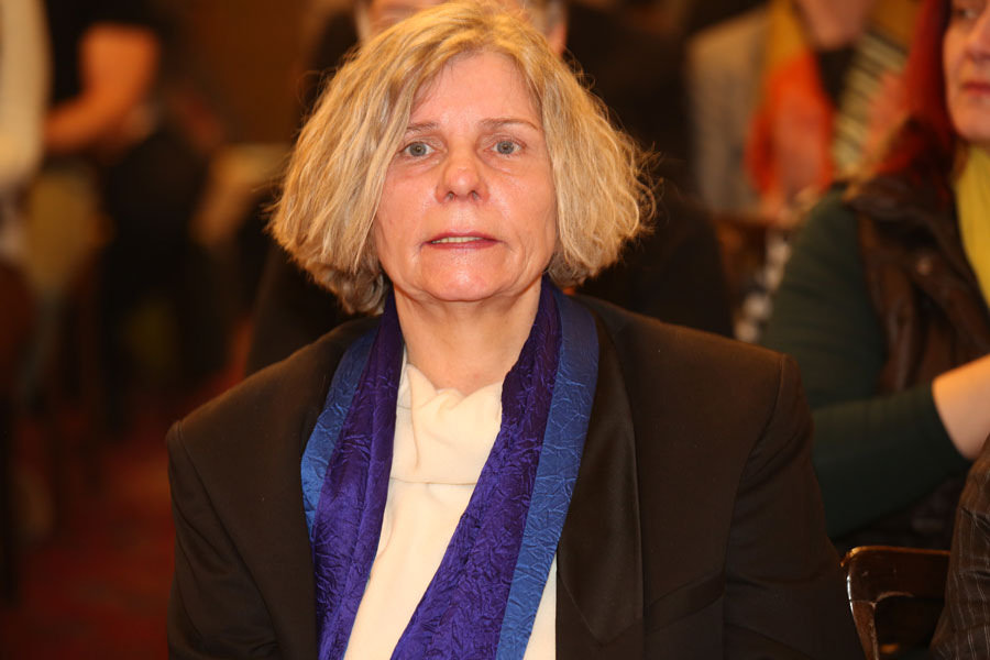 Ursula Kubes-Hofmann-3838